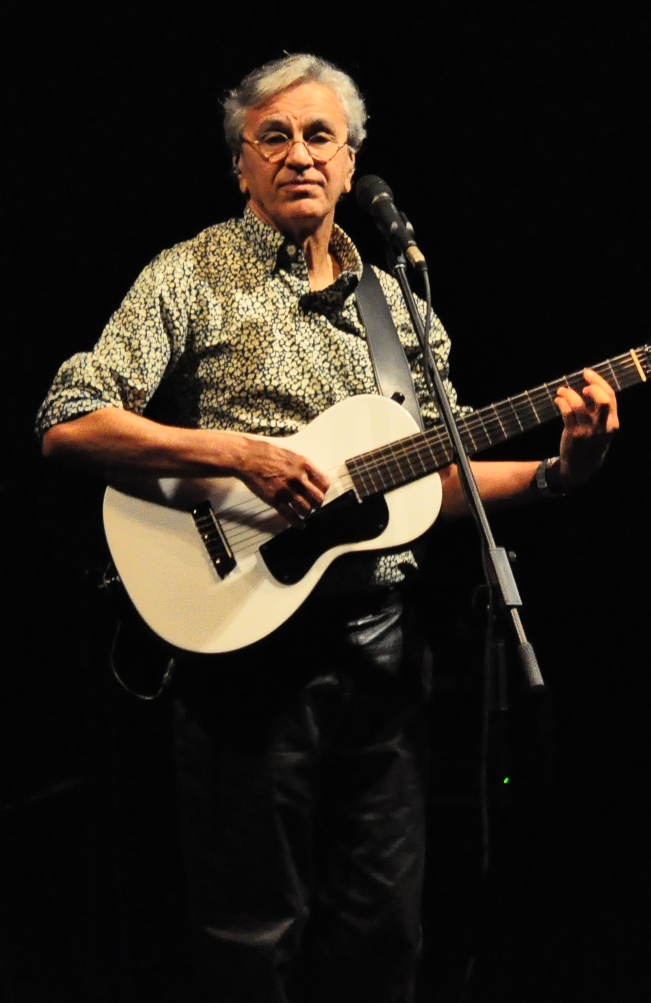 Caetano Veloso - Festival Natura Musical Belo Horizonte 04/08/13